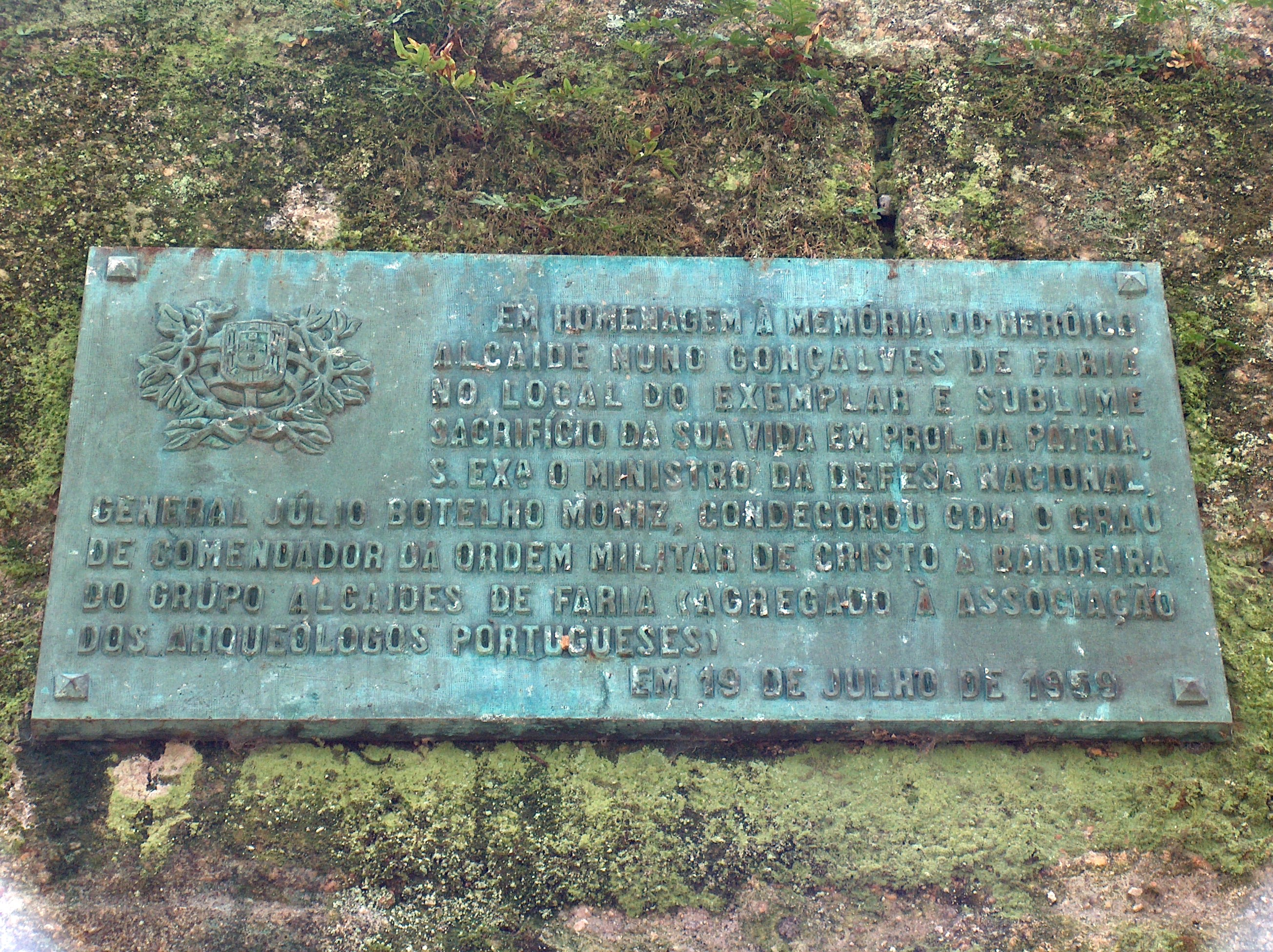 Castelo de Faria. no concelho de Barcelos, distrito de Braga, Portugal.